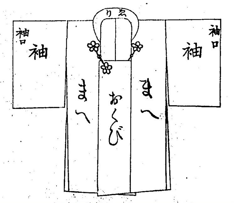 被布 女学裁縫教授書. 下